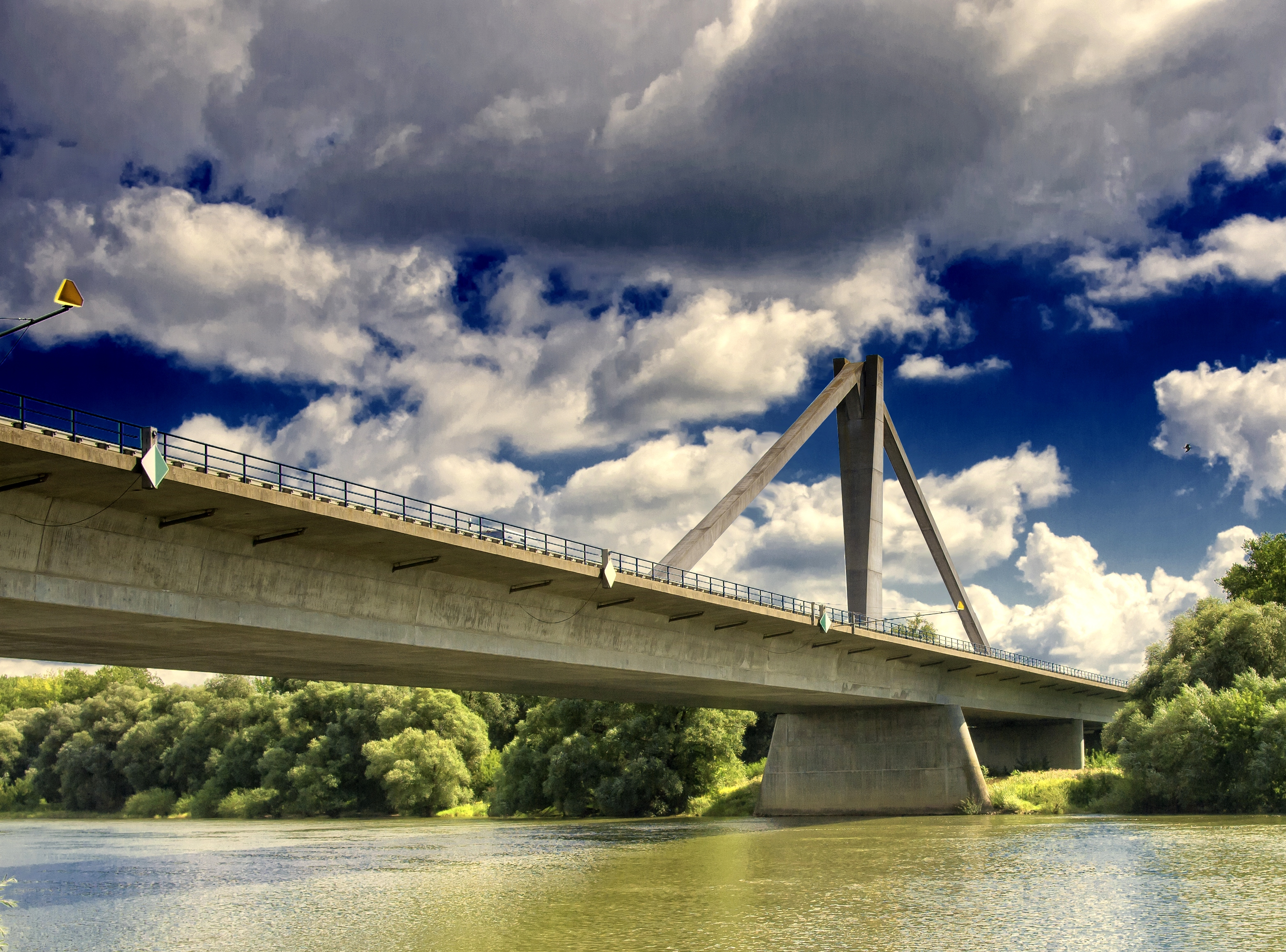 Donaubruecke Metten, Blickrichtung Südwesten auf die Donauinsel Wörth